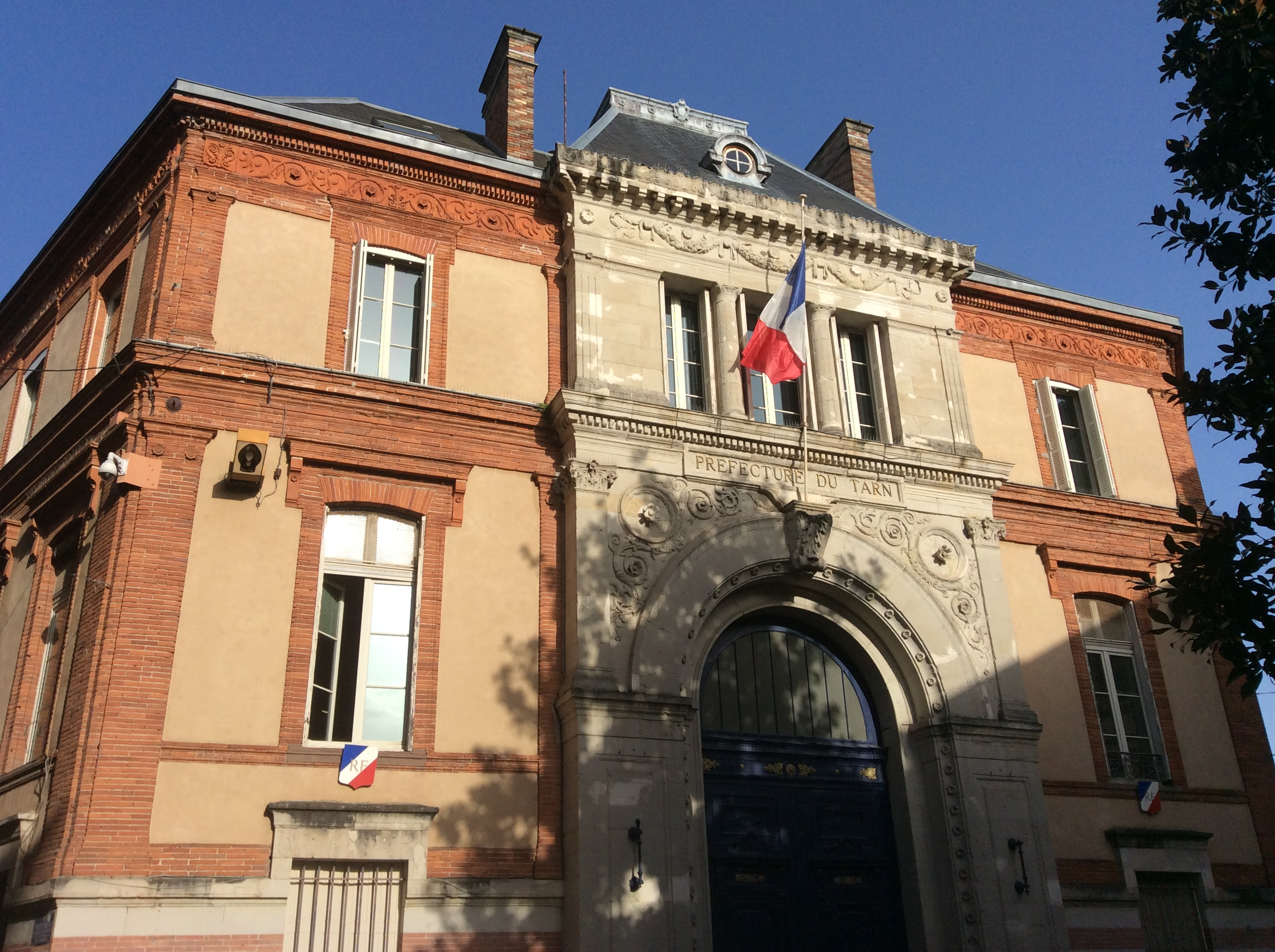 Préfecture du Tarn à Albi.